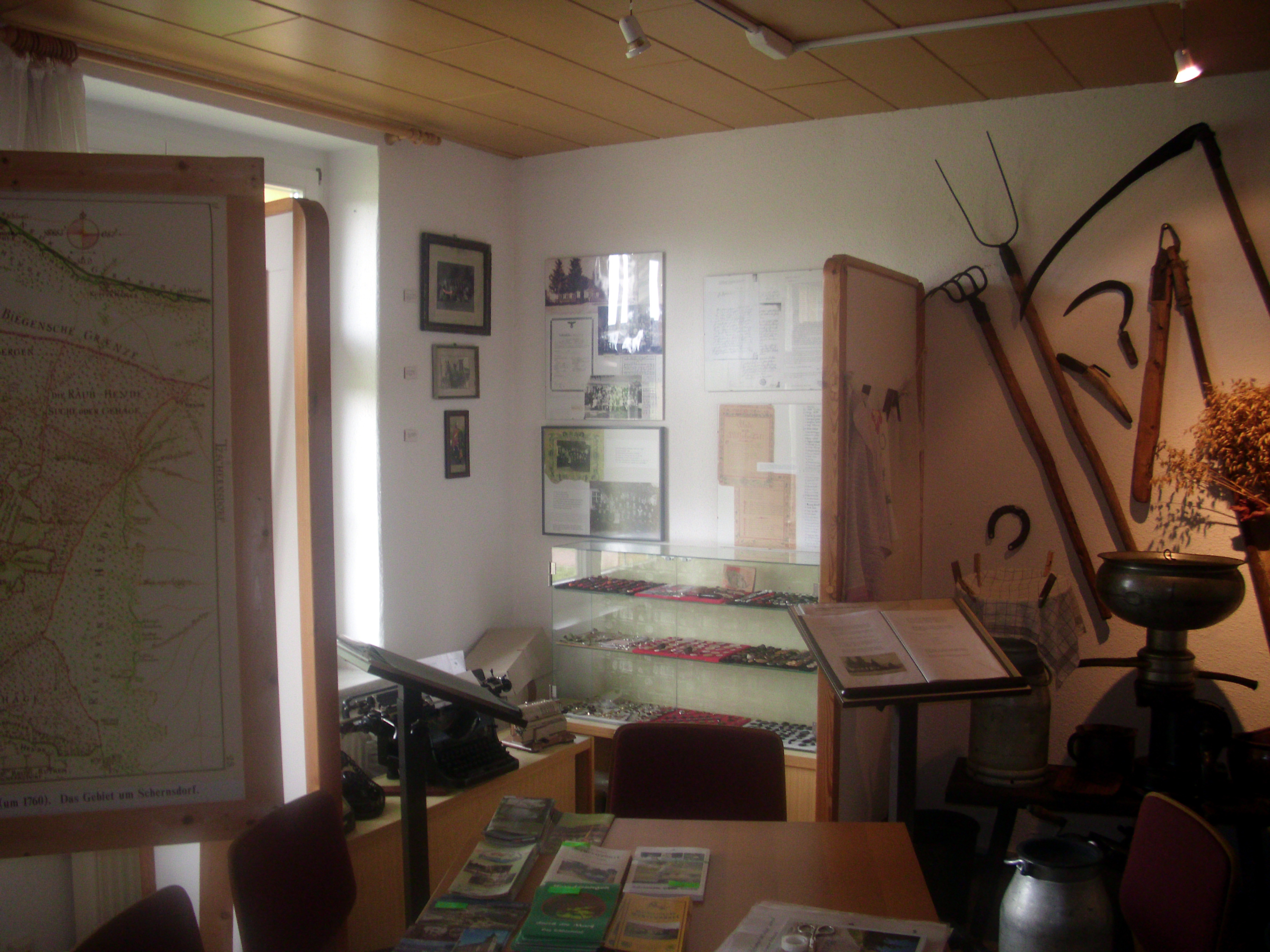 Sammlung des Heimatvereins Schernsdorf, Gemeinde Siehdichum, Schlaubetal, Brandenburg